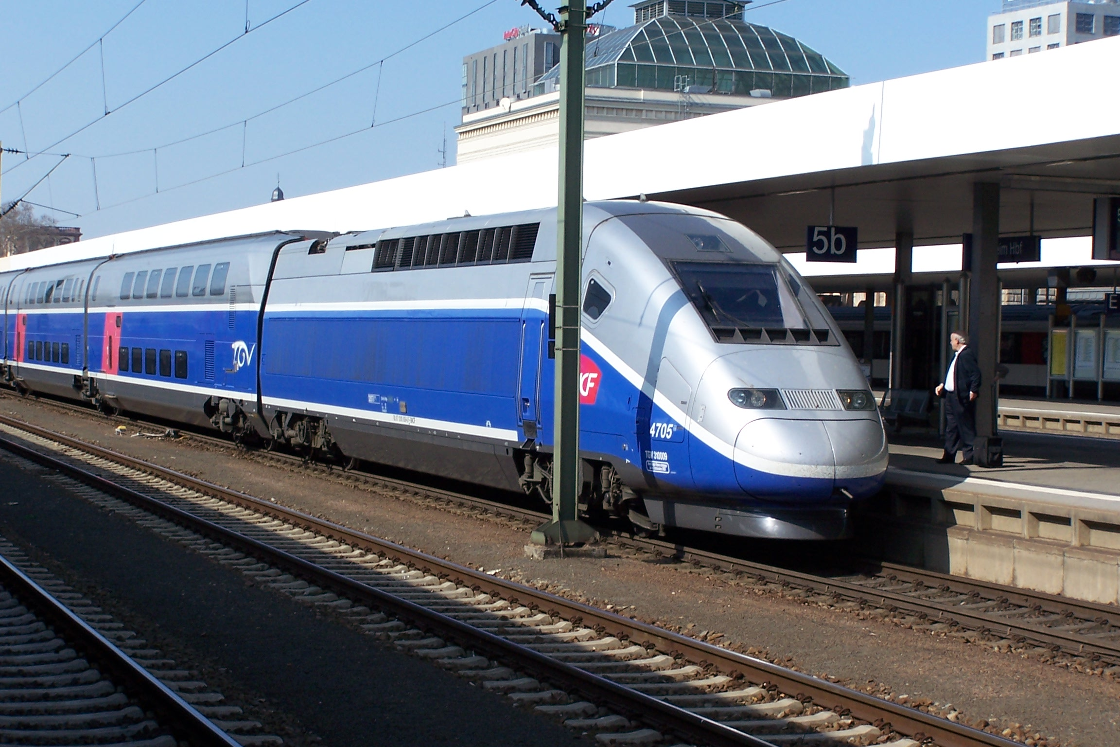 TGV 9580 am 25. März 2012 in Mannheim auf dem Weg nach Marseille.